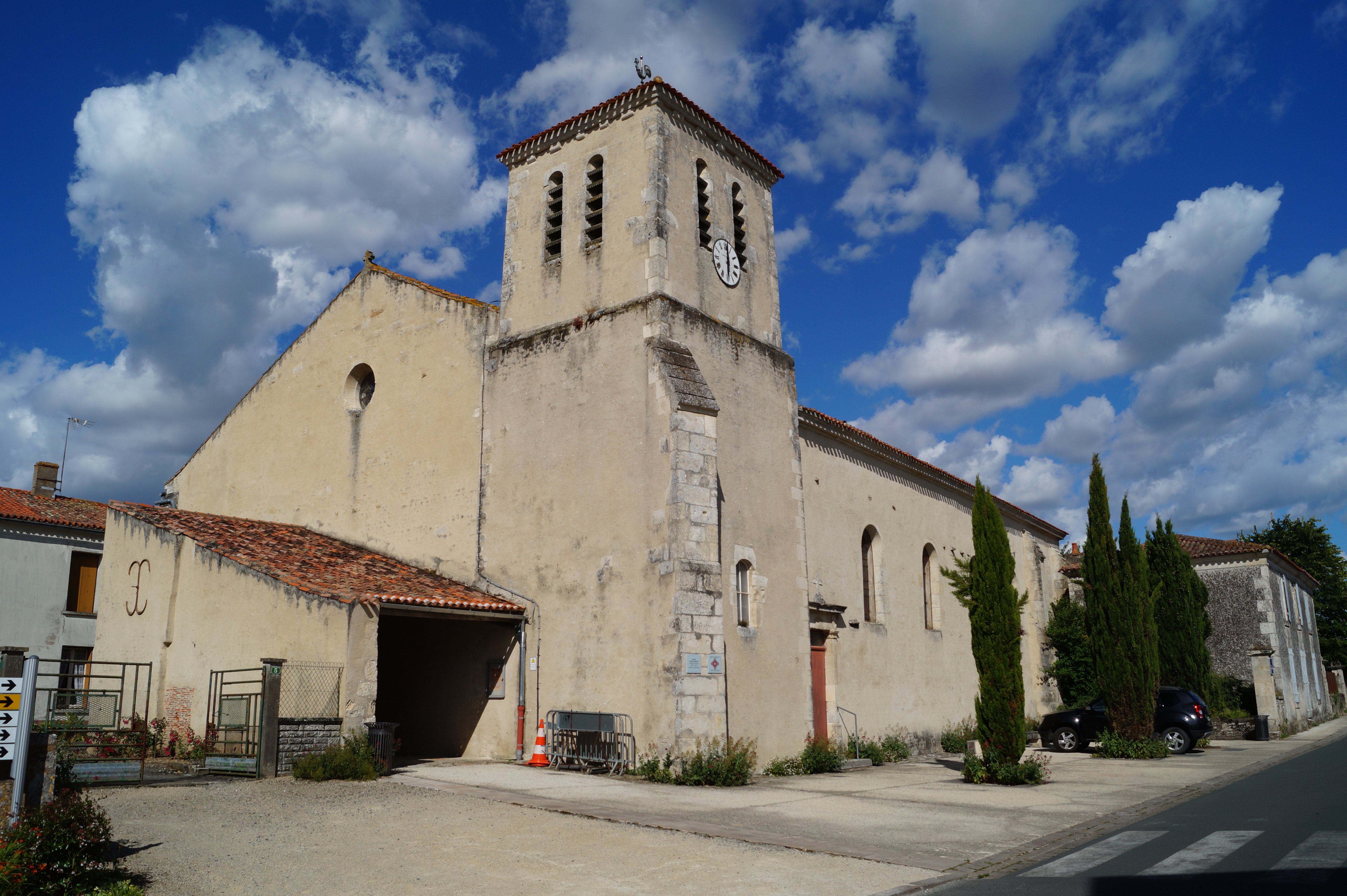 L’église Saint-Maxent de Vouillé-les-Marais depuis la rue du Huit-Mai-1945.